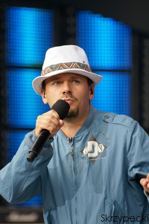 Krzysztof Kasowski @ 46. KFPP in Opole.